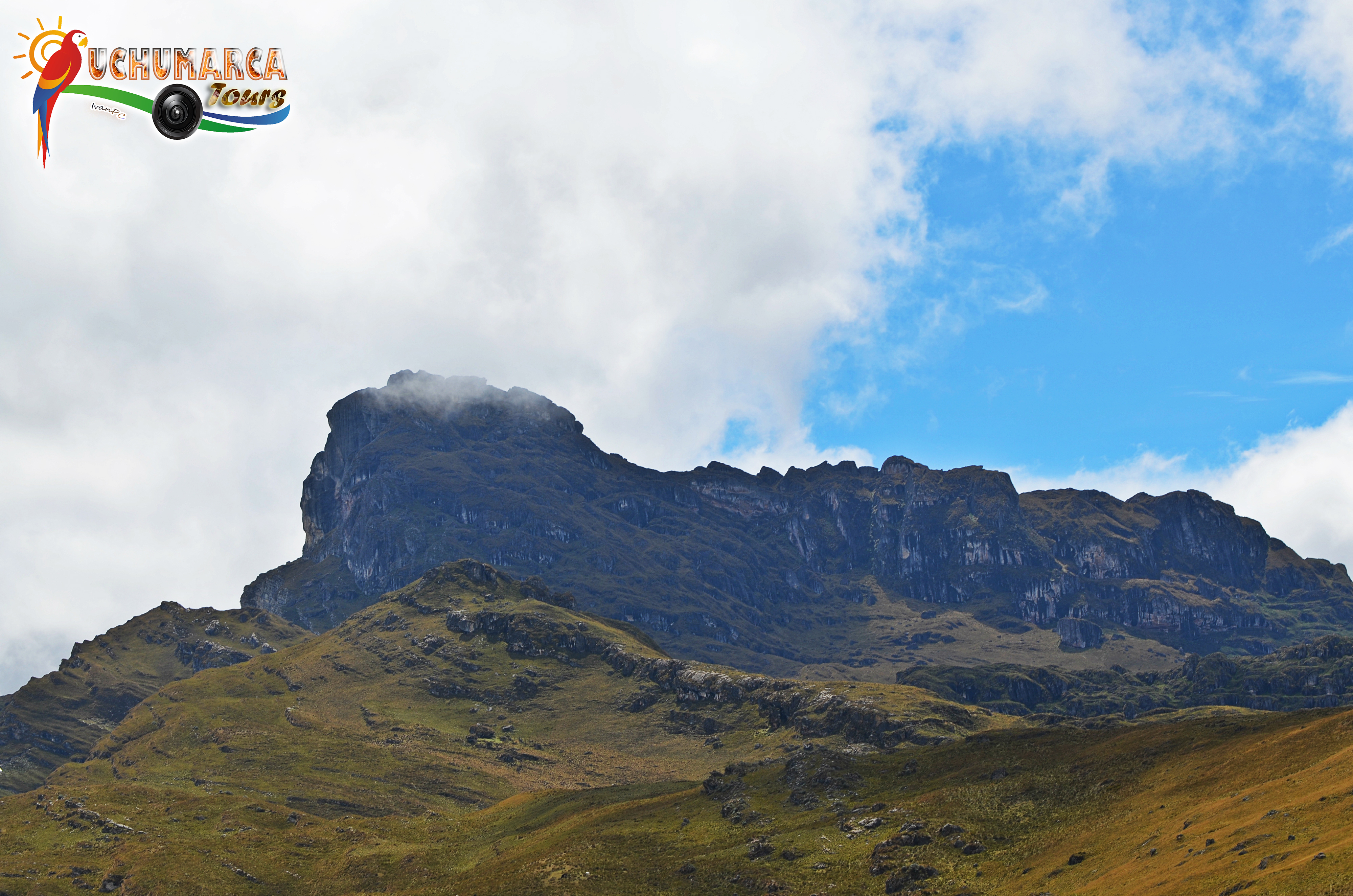 Cerro Guardián - Kumullka